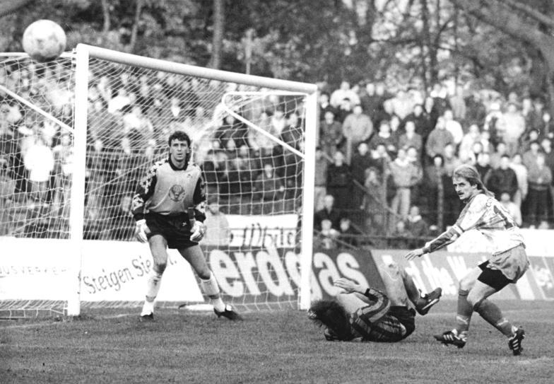 ADN- Rainer Weisflog-3.11.90- Cottbus: Fußball- Oberliga Nordost- 10. Spieltag- FC Energie Cottbus - 1. FC Magdeburg 0:0 Szene vor dem Gehäuse des Magdeburger Torhüters Dirk Heyne: Die Spieler können dem Ball nur noch hinterherschauen.